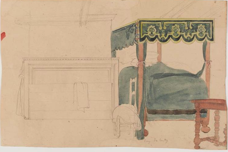 François-Hippolyte Lalaisse (1810-1884) - élément d'ensemble - Croquis mine de plomb d'un baldaquin - Marseille, musée des Civilisations de l'Europe et de la Méditerranée